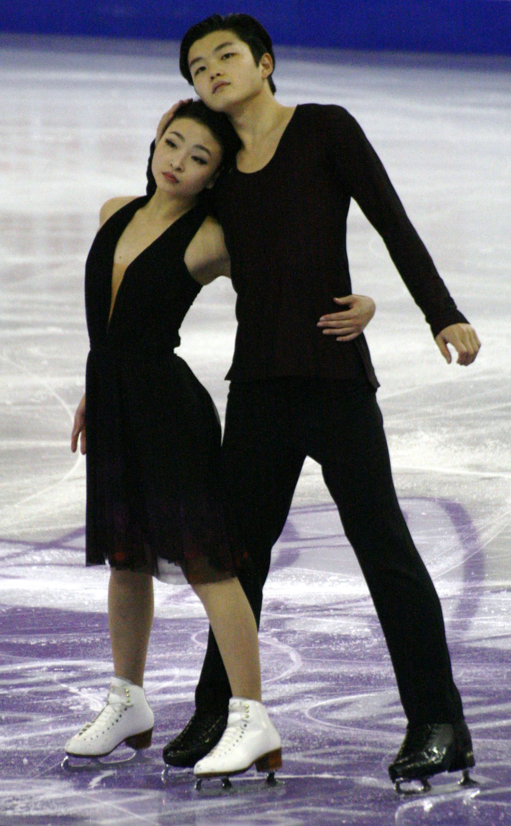 Майя и Алекс Шибутани (США) на финале Гран-при по фигурному катанию 2015-2016.